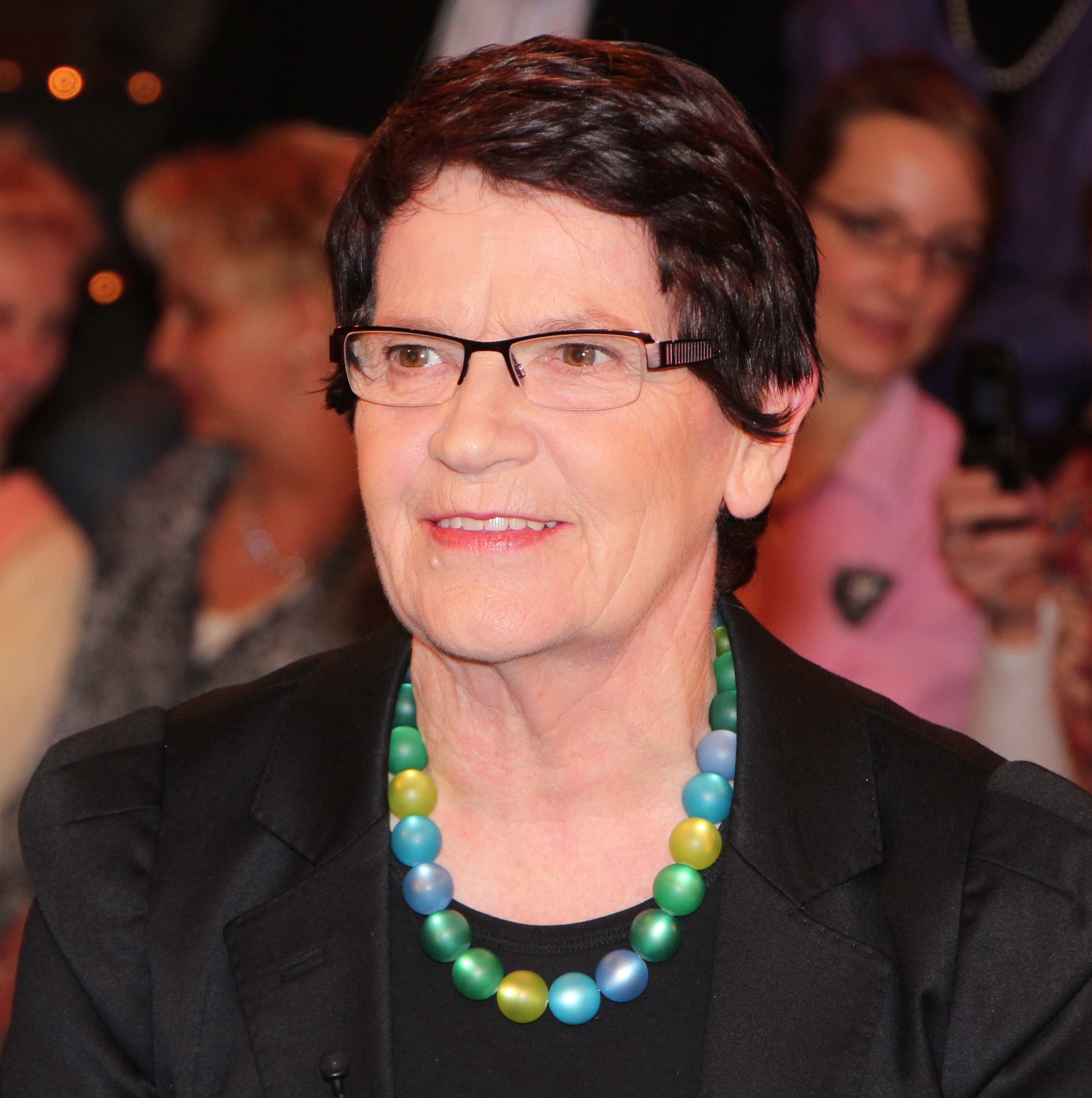 Rita Süssmuth geb. Kickuth (* 17. Februar 1937 in Wuppertal) ist eine deutsche Politikerin (CDU)